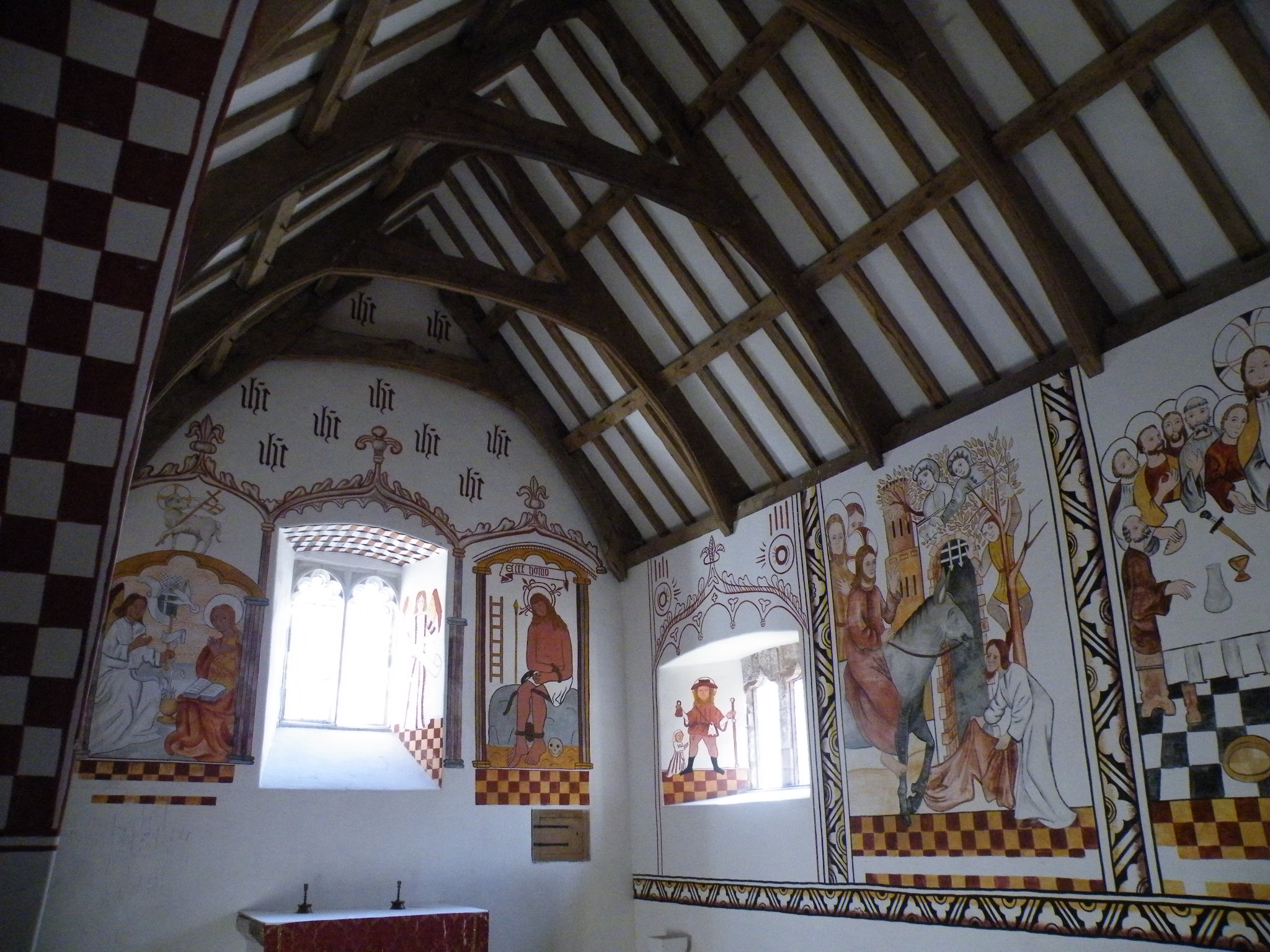 tu mewn yr eglwys